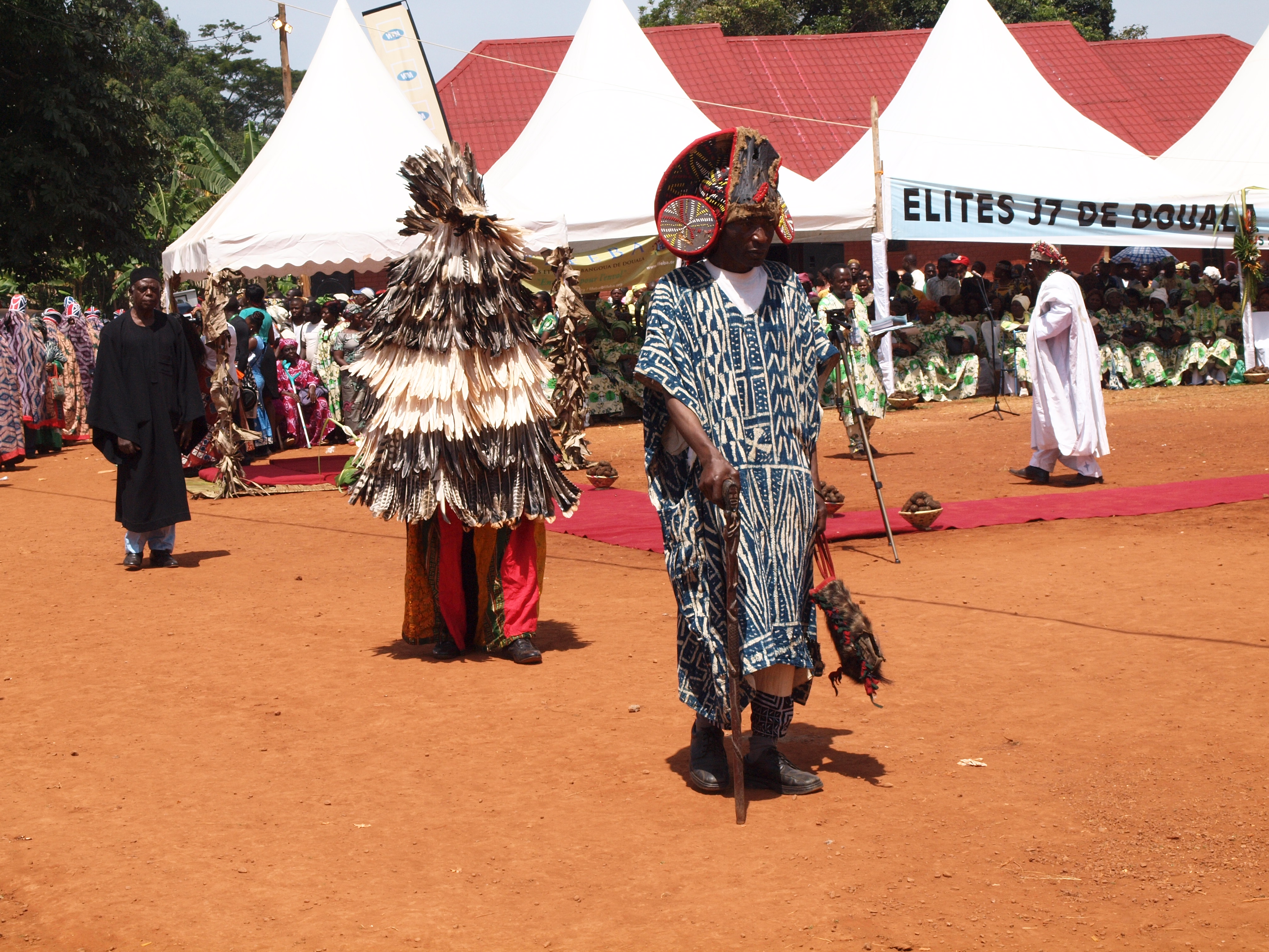 Festival du macabo à Bangoua, région de l'Ouest du Cameroun, département du Ndé This is an image of music and dance from Cameroon